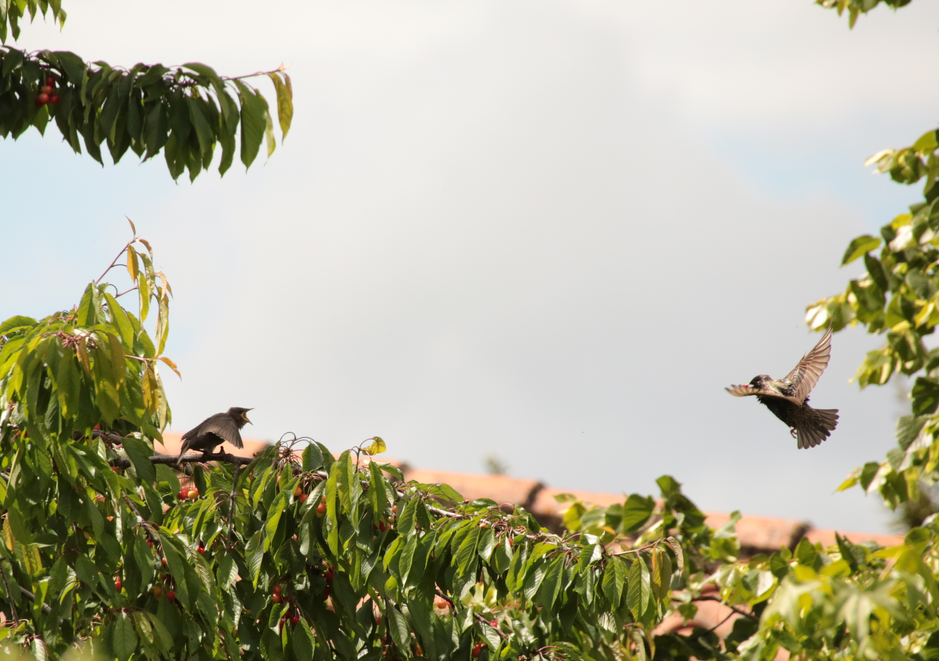 Juvénile se nourrissant de cerises